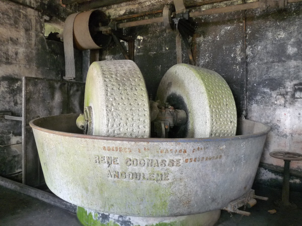 Ancienne papeterie de la Courade, La Couronne, Charente, France. Meules pour faire la pâte.